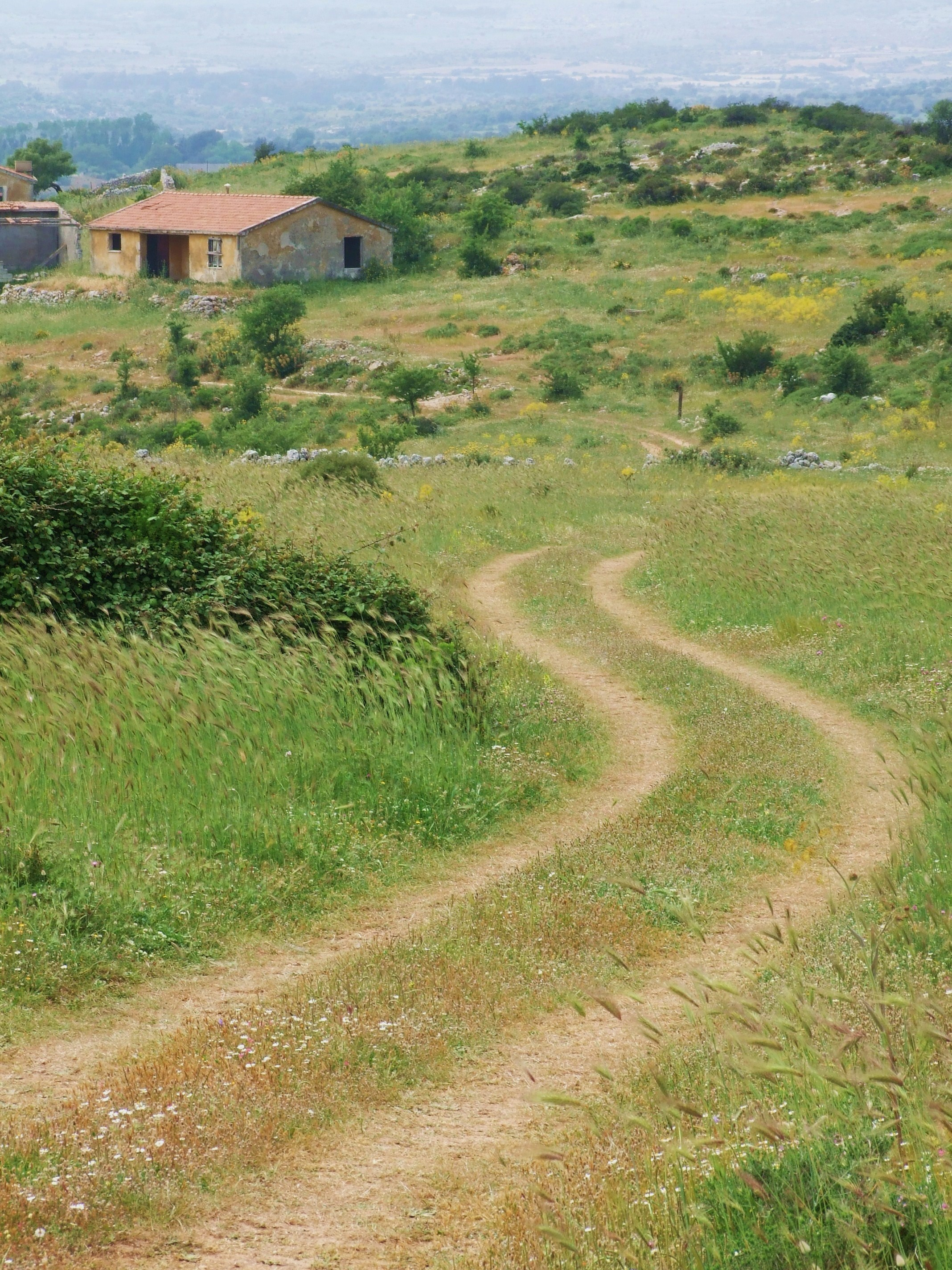 Acquerello (no Photoshop)